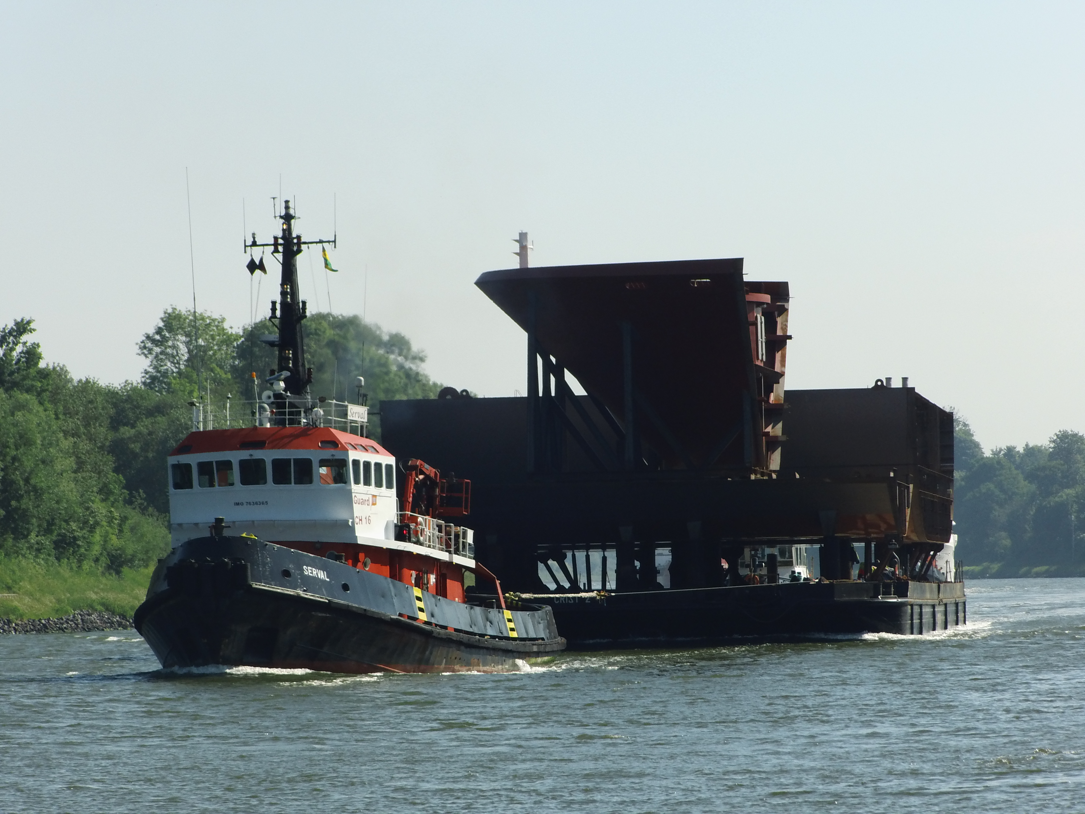 Spectrum of the Seas sections in Kiel Canal/Landwehr.